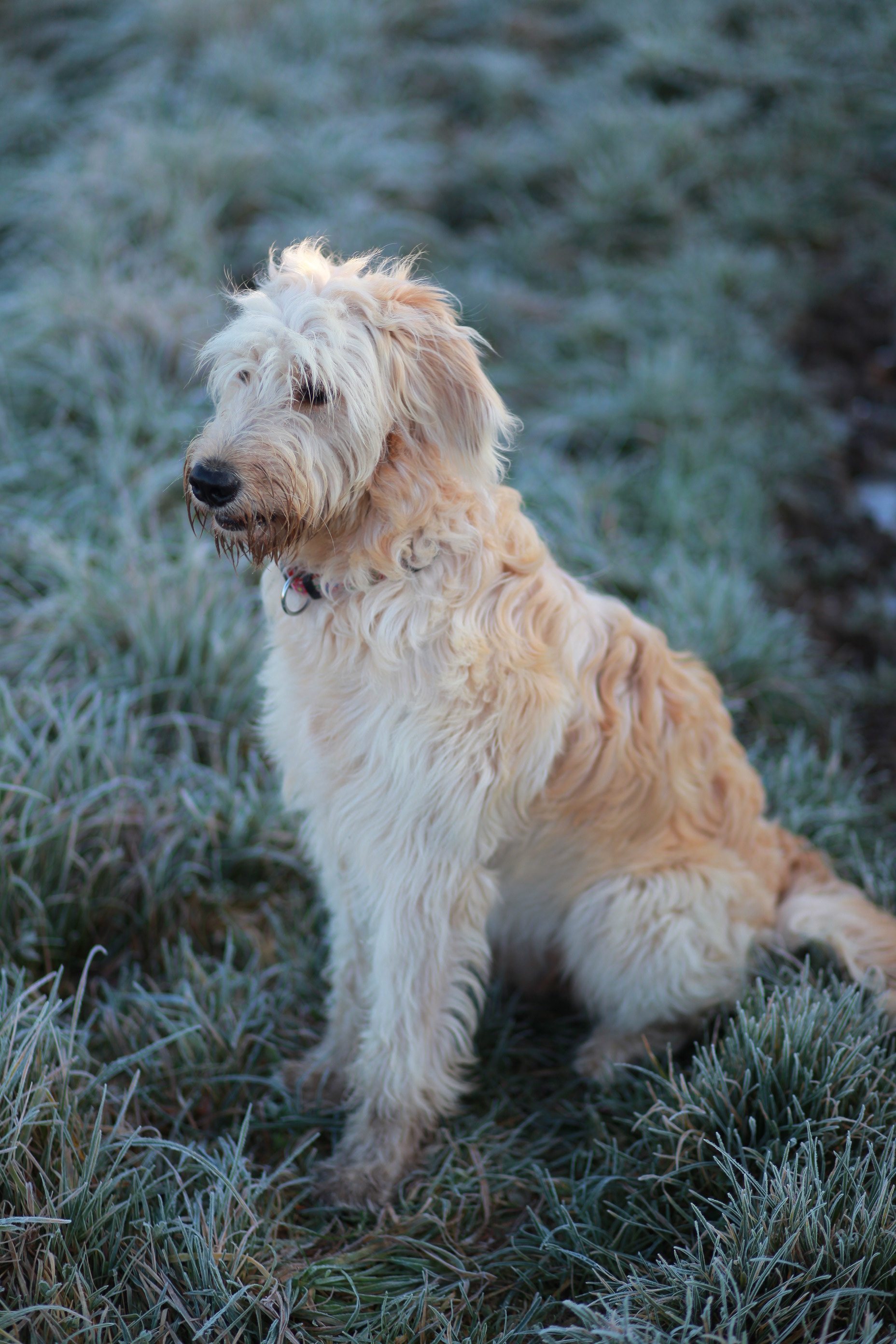 Goldendoodle, Alter 9 Monate